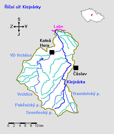 Říční síť Klejnárky